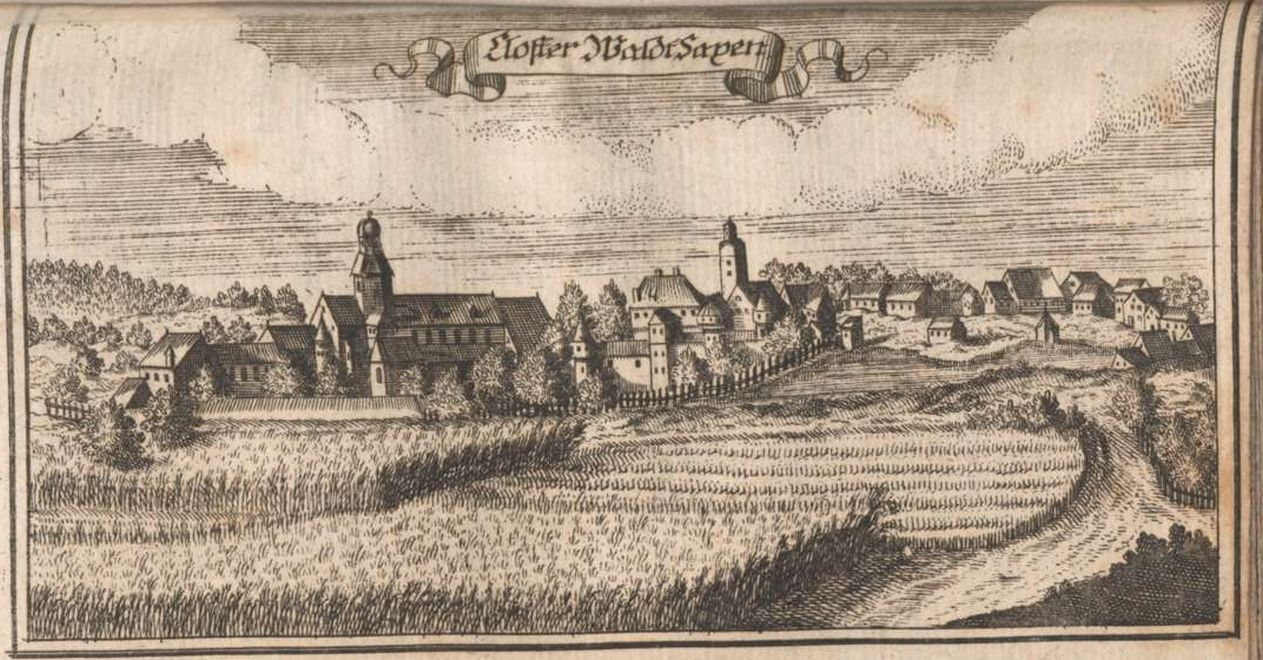 aus: Kurbayerischer Atlas - Nürnberg : Bleul, 1690